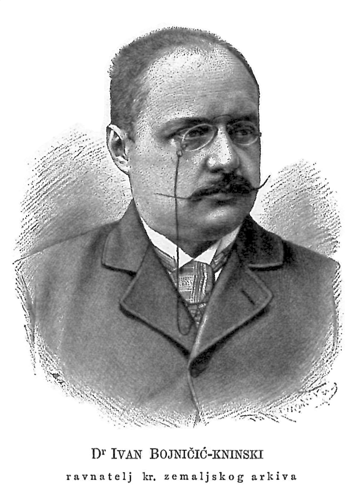 Ivan von Bojničić (1858 - 1925), kroatischer Jurist und Archivar